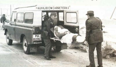 Land Rover de la Agrupación de tráfico de la Guardia Civil